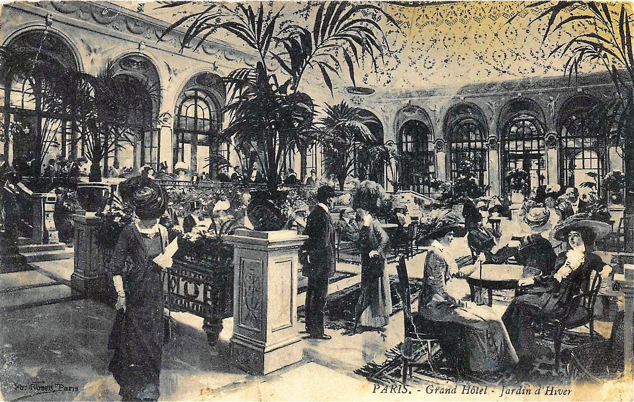 Carte postale - Paris. - Grand-Hôtel - Jardin d'Hiver